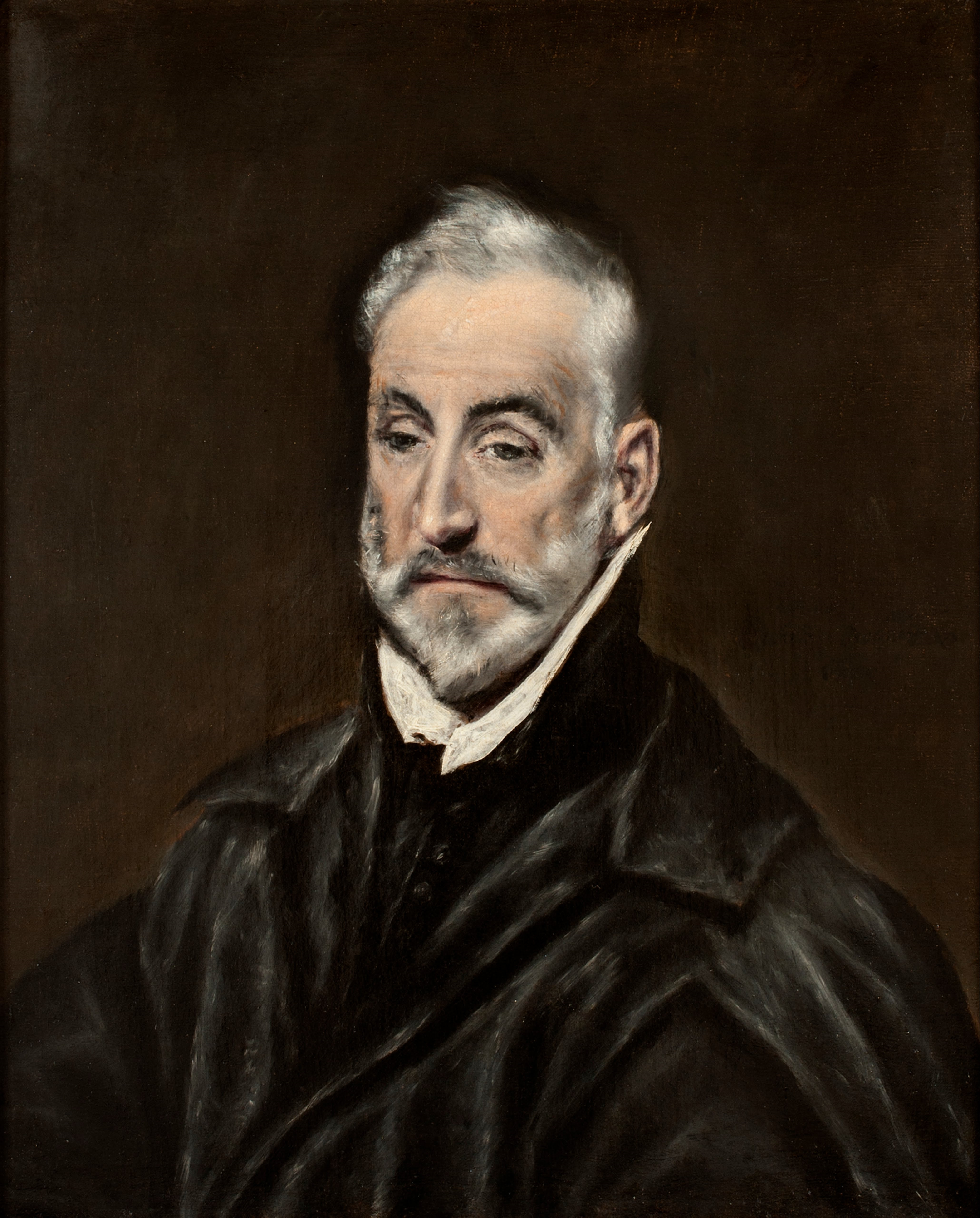 Esta obra es un retrato del erudito y humanista español Antonio de Covarrubias y Leiva (Ca. 1524-1604), que fue amigo personal de El Greco y de quien este pintor pintó otro retrato que se conserva en el parisino Museo del Louvre.